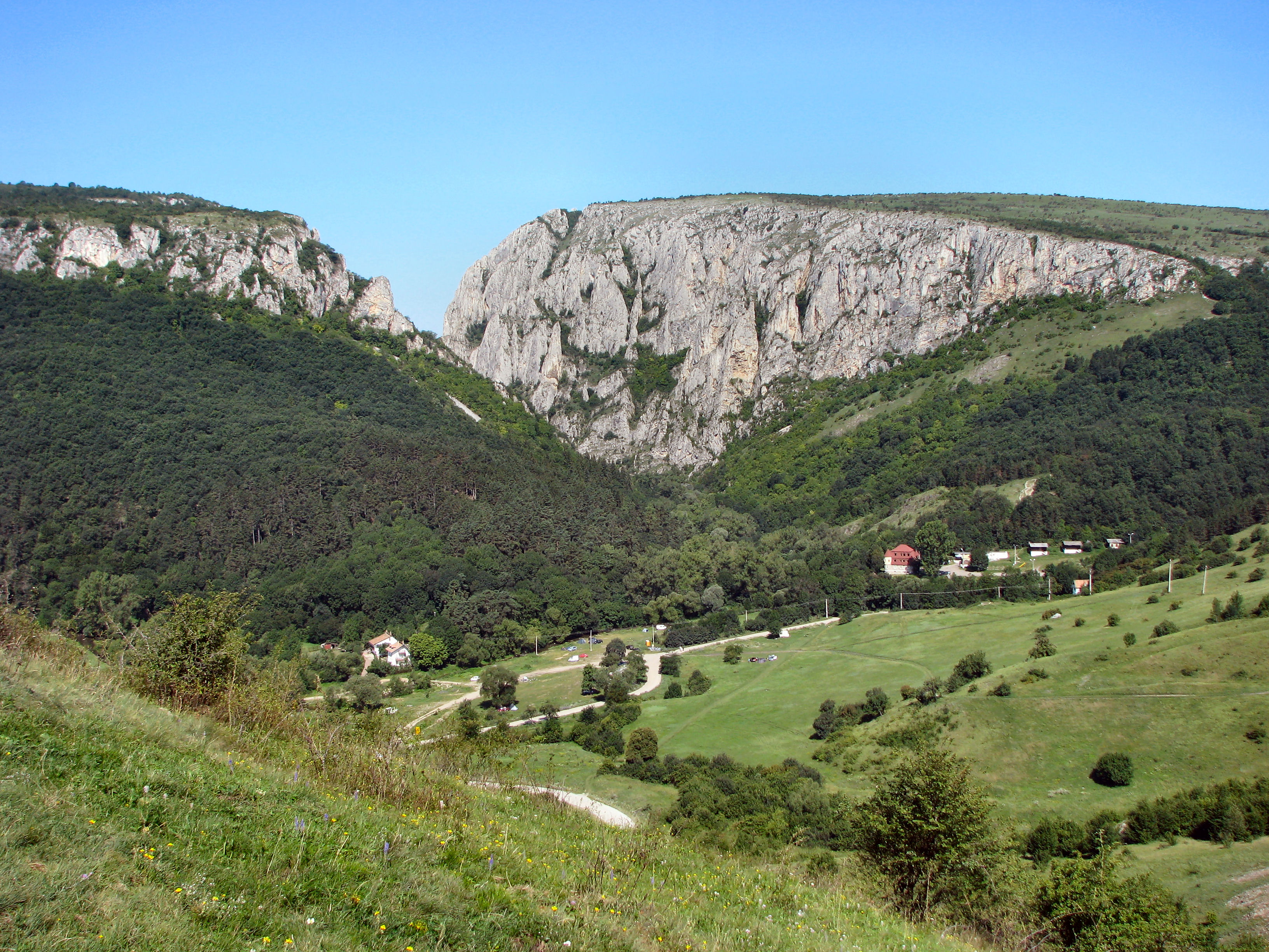 A Tordai hasadék távolról